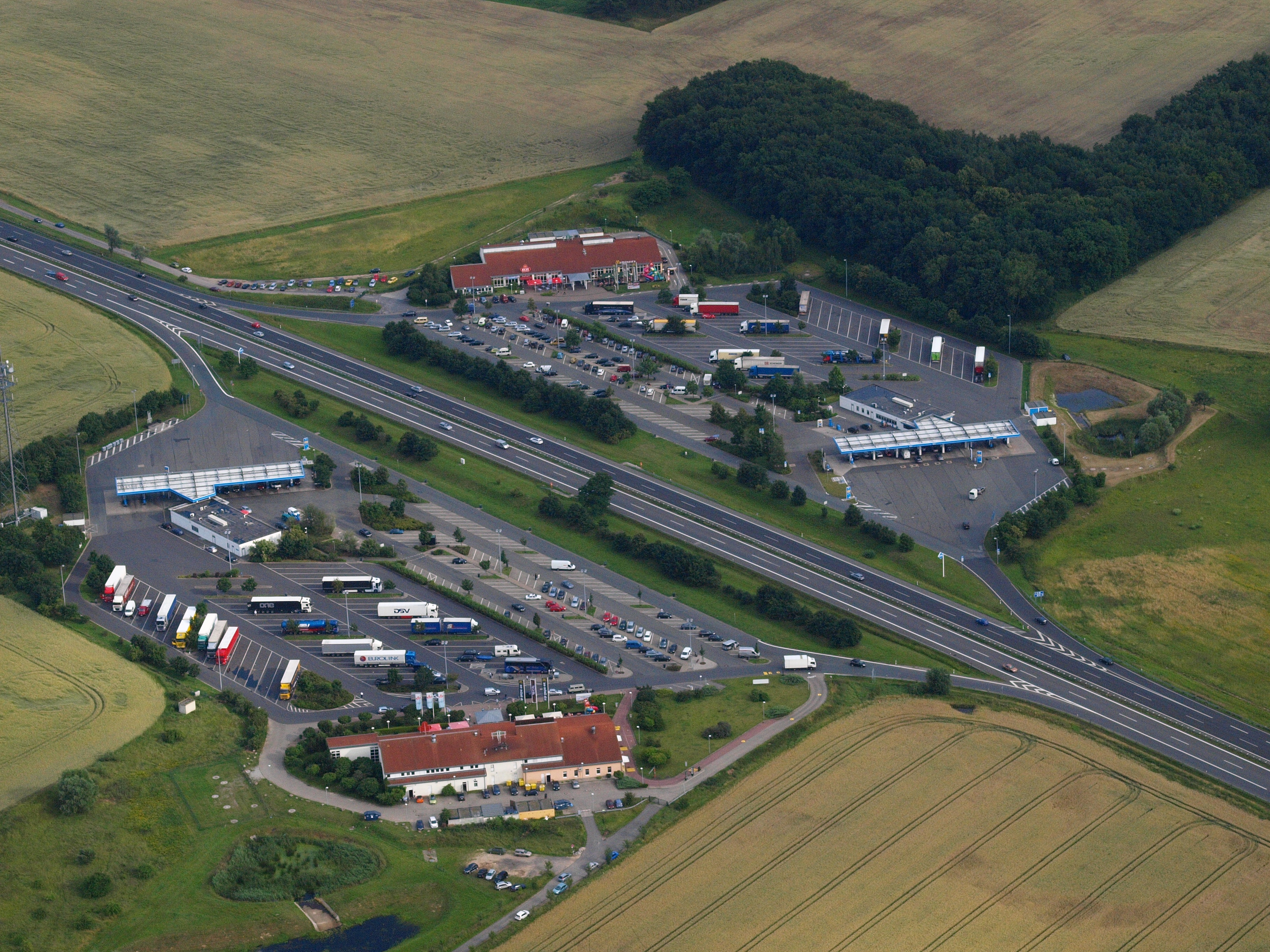 Bundesautobahn 24, Raststätte Linumer Bruch Nord